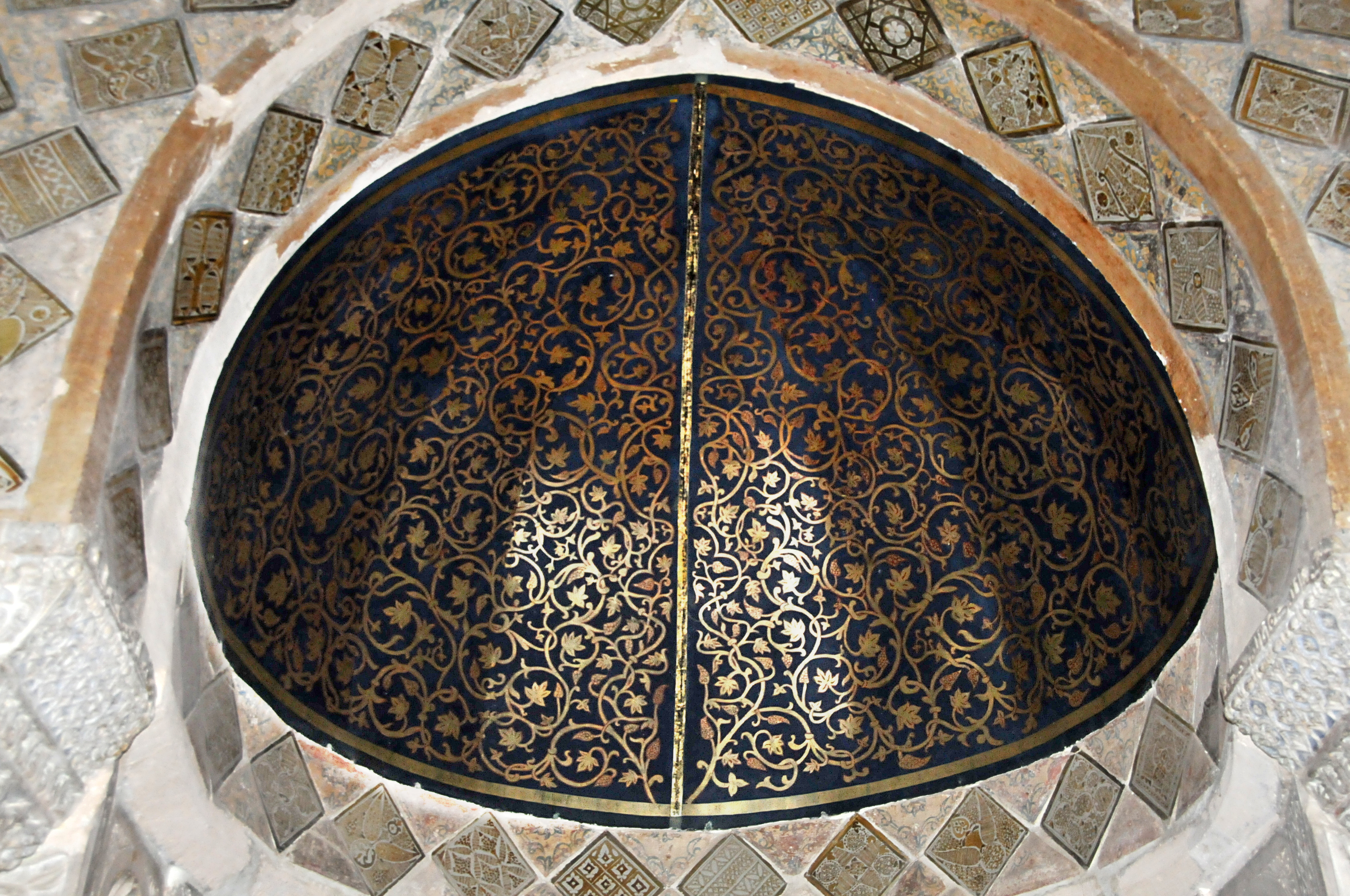 Demi-coupole peinte coiffant la niche du mihrab dans la salle de prière de la Grande Mosquée de Kairouan, en Tunisie.